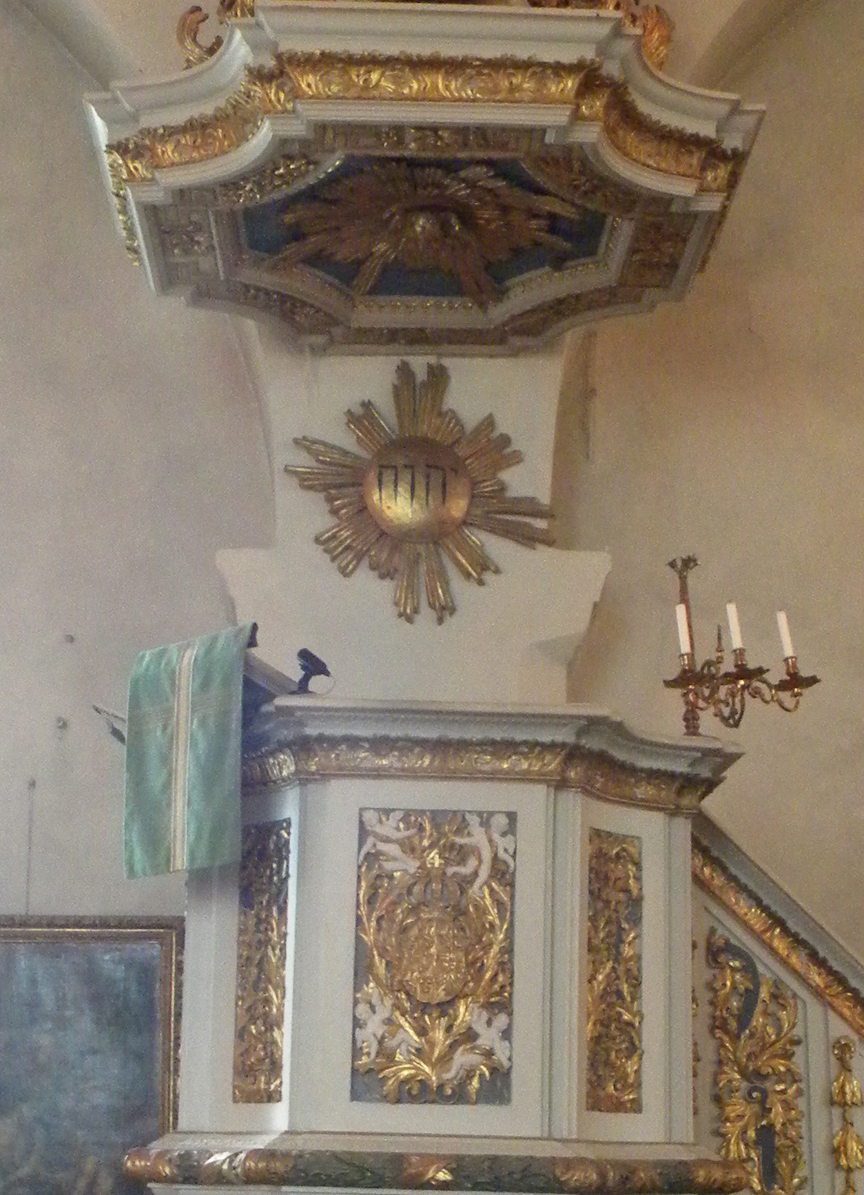 Predikstol från 1701 i Mariefreds kyrka skulpterad av hovbildhuggaren Kaspar Schröder (1652-1701).